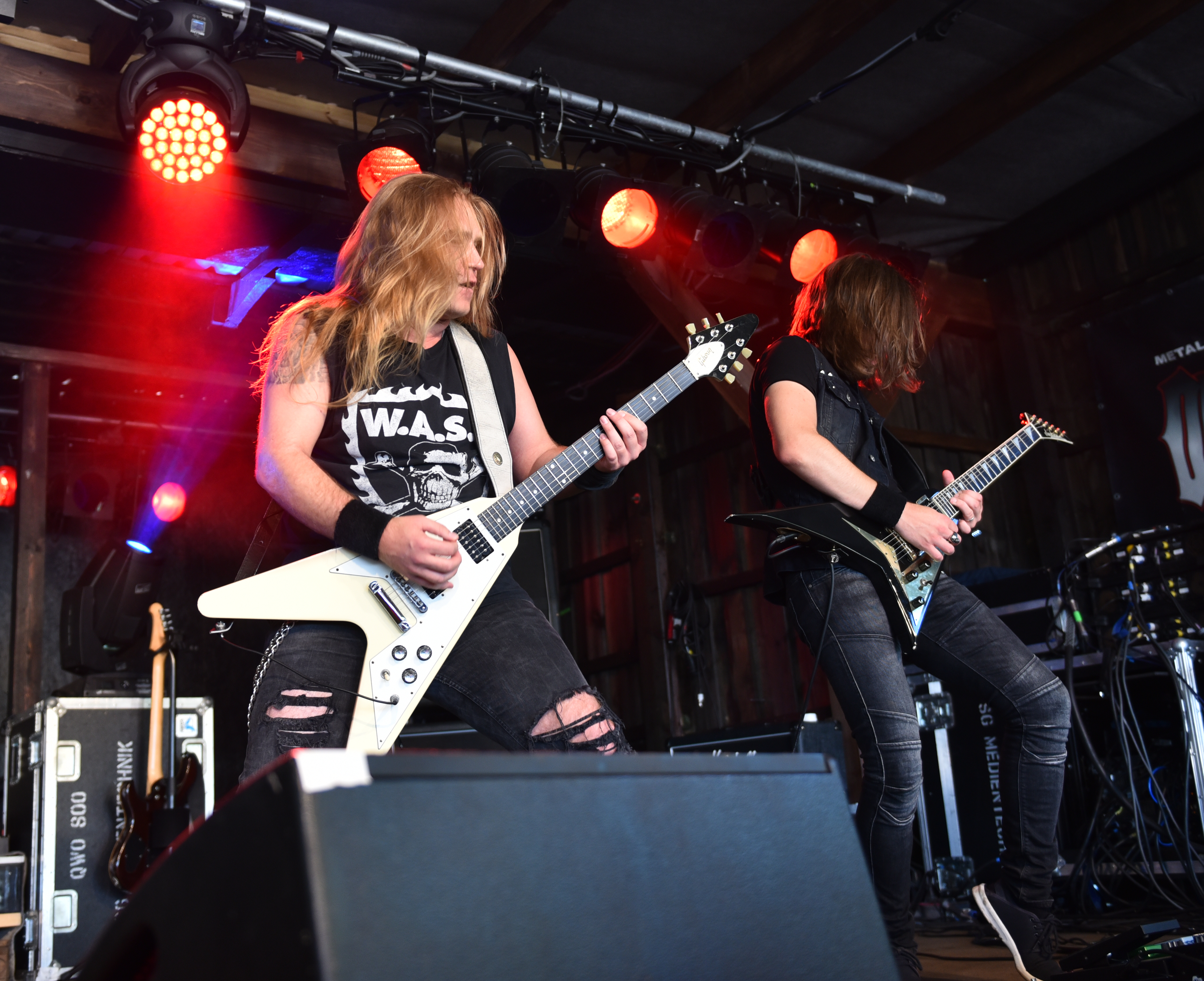 Stormwarrior beim Headbangers Open Air 2017